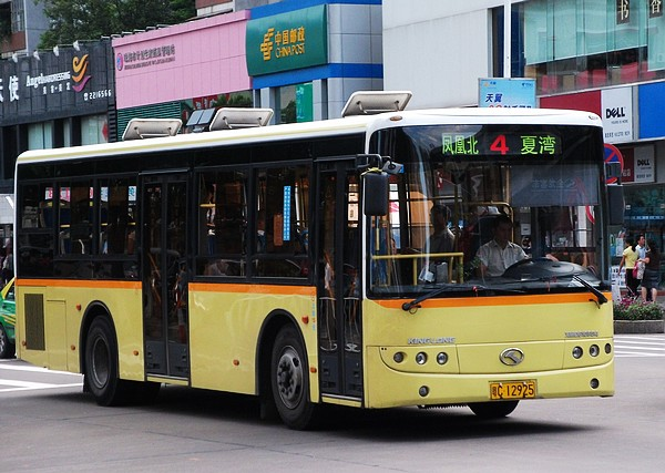 珠海公交4路线